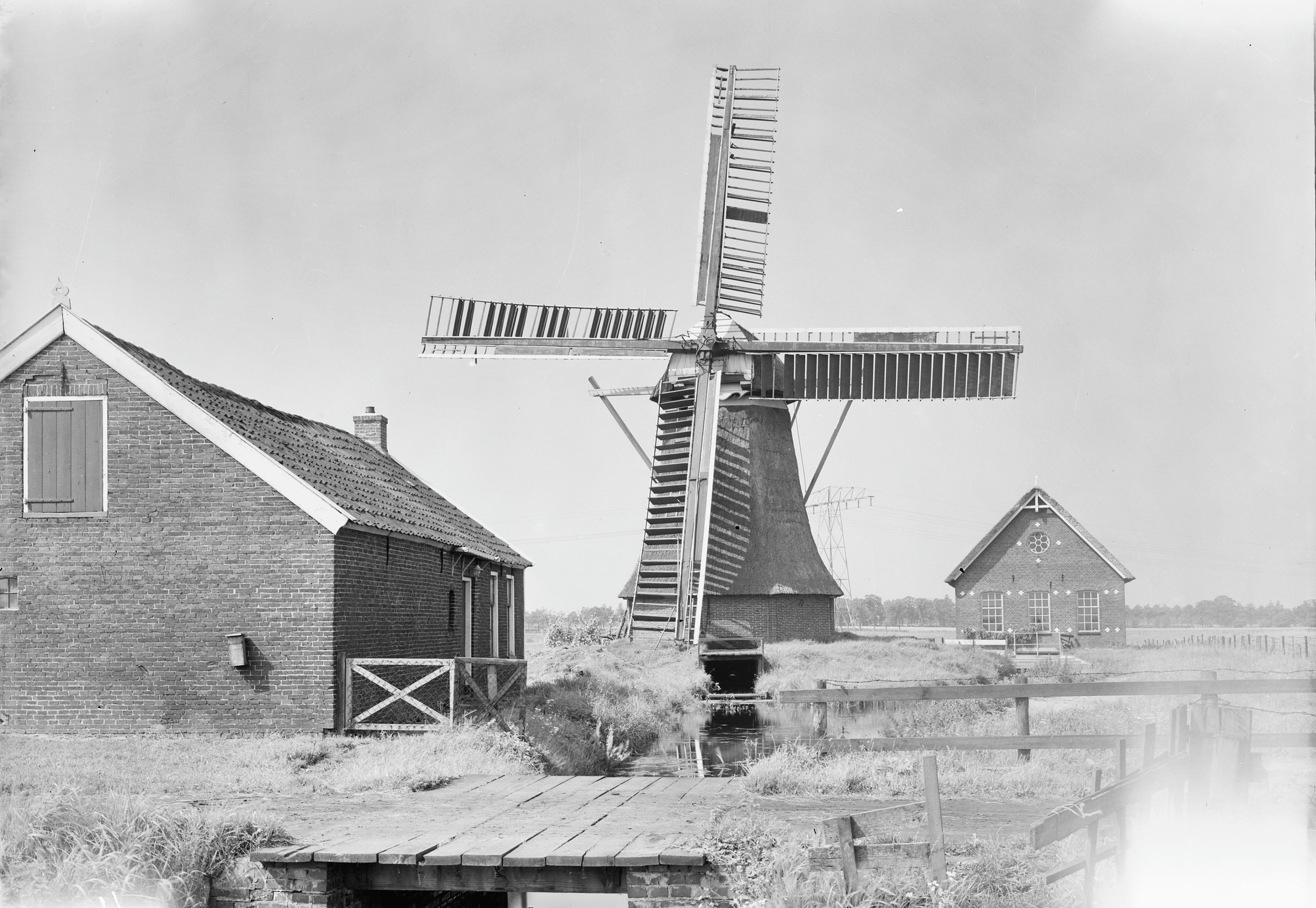 Molens